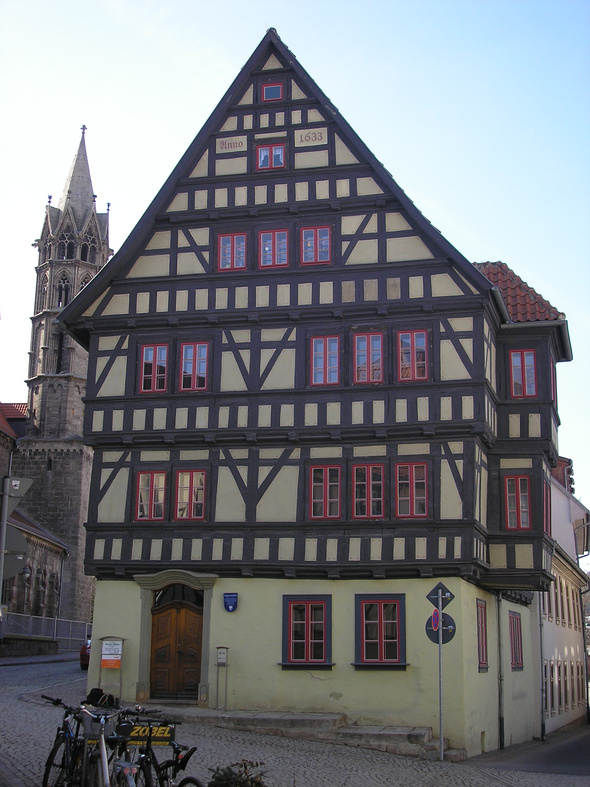 Die Papiermühle in Arnstadt (Thüringen).